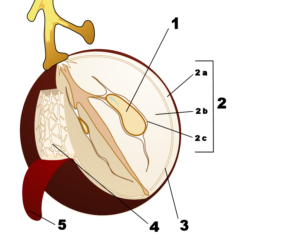 Διάγραμμα τυπικής ράγας σταφυλιού: 1=Σπόρος ή σπέρμα, 2=Περικάρπιο [2a=Εξωκάρπιο, 2b=Μεσοκάρπιο, 2c=Ενδοκάρπιο] 3,4=Περιφερειακές αγγειώδεις δεσμίδες, 5=Επιδερμίδα ή φλοιός